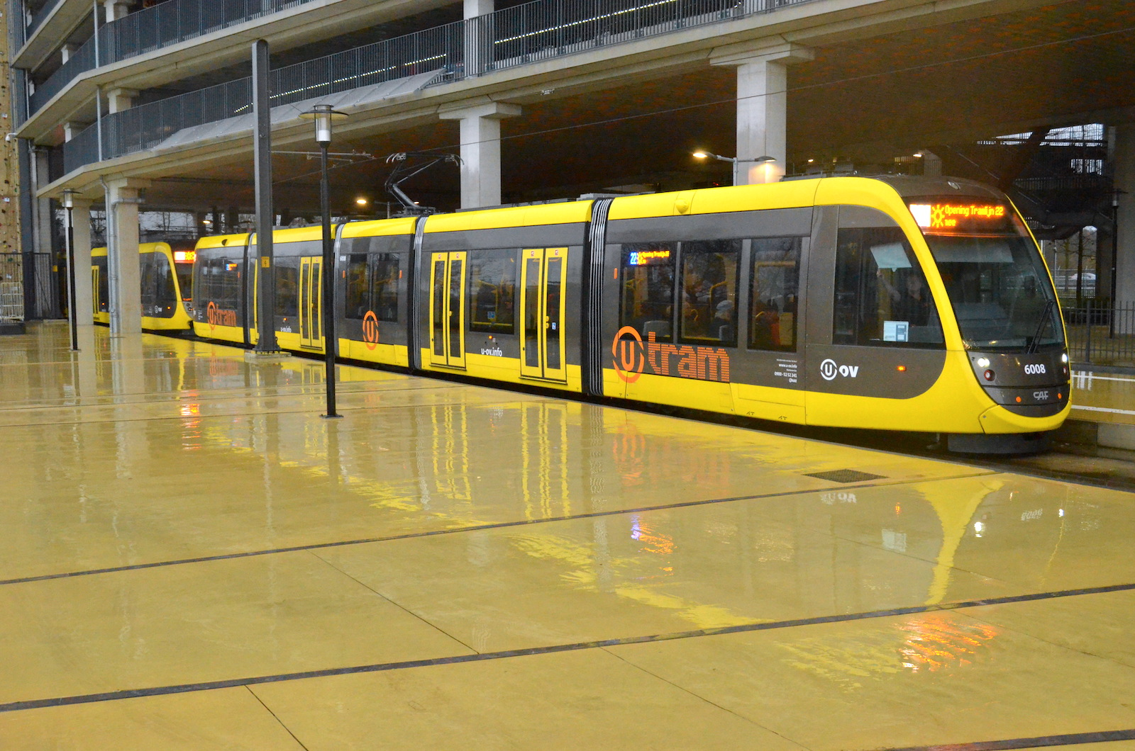 Tramstel 6008 van de Uithoflijn op de halte P+R Science Park, op de openingsdag; 14 december 2019. Foto: Erik Swierstra.